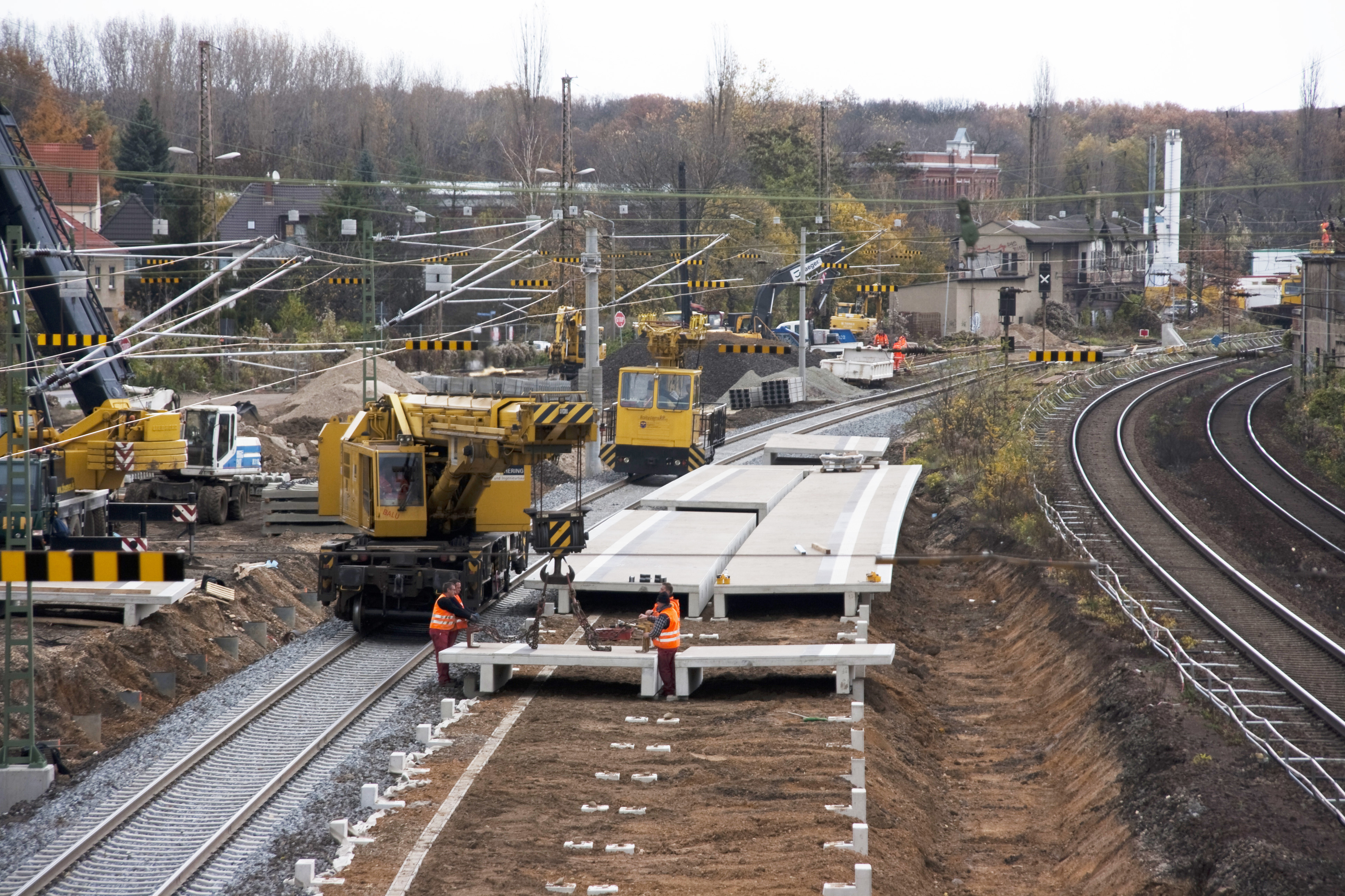 Montage der Bahnsteigelemente am Inselbahnsteig in Leipzig Leutzsch mit einem Eisenbahnkran. Rechts im Hintergrund das Befehlsstellwerk mit dem nach dem Unfall 1973 neugebauten Gebäudeteil, erkennbar am grauen Rauputz.